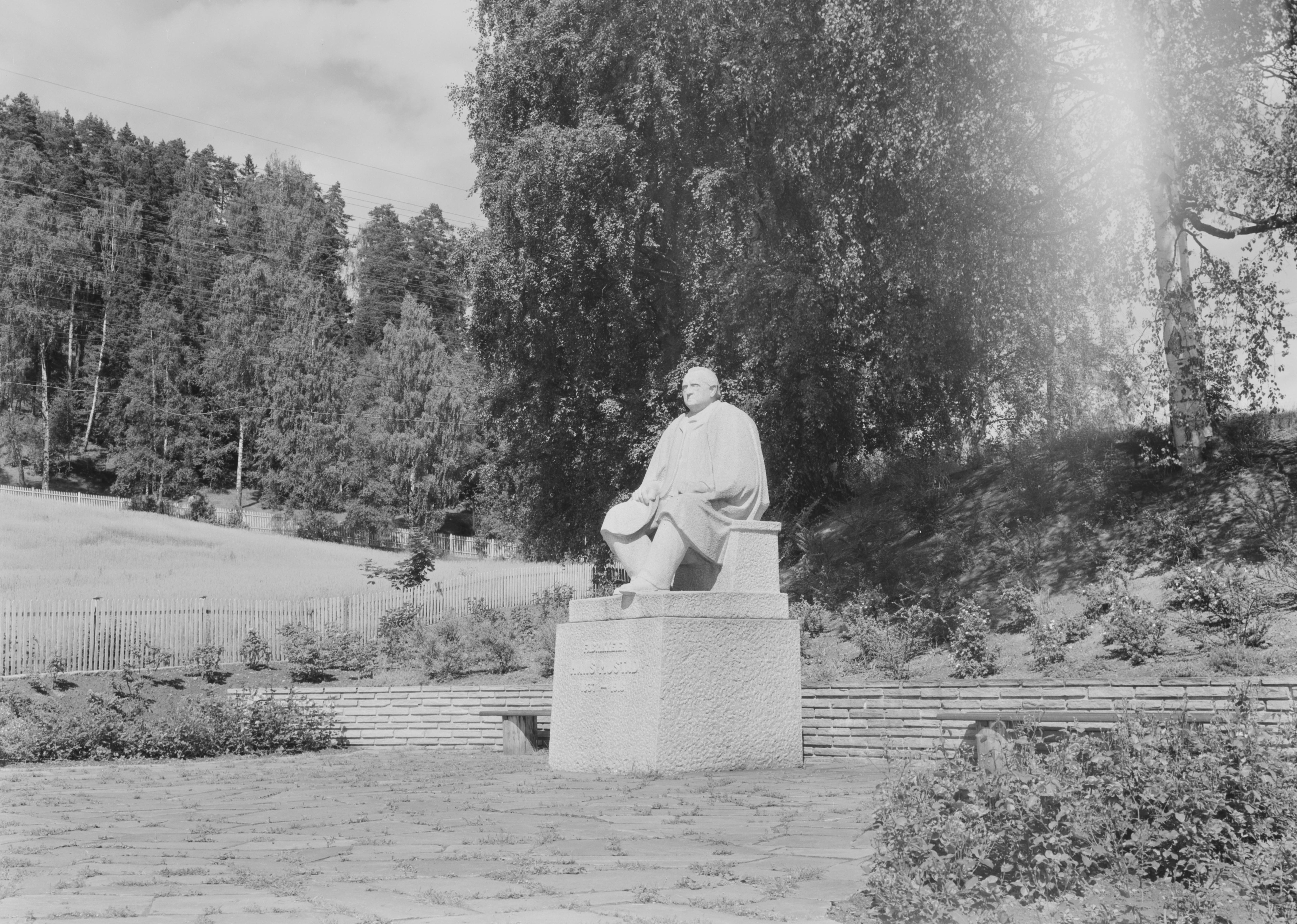 Bildet er hentet fra Nasjonalbibliotekets bildesamling Gjøvik, Gjøvik, Oppland